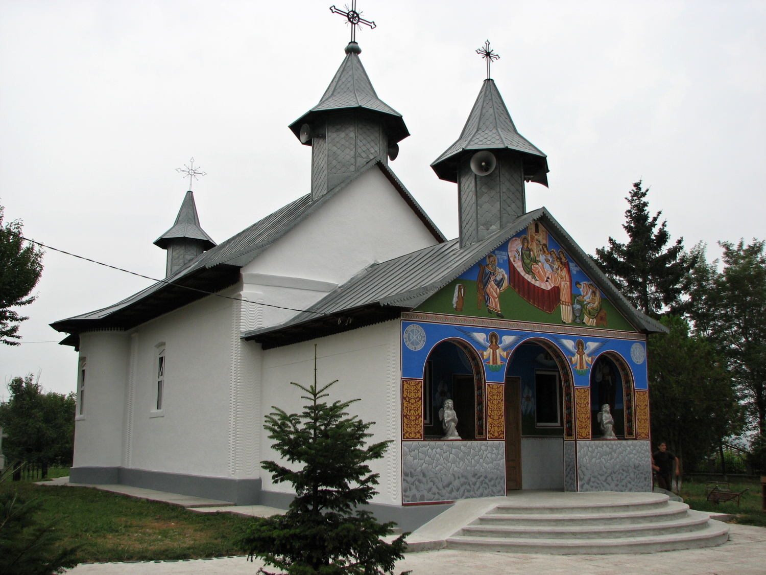 Biserica Sfântul Ioan Botezătorul din Stamate